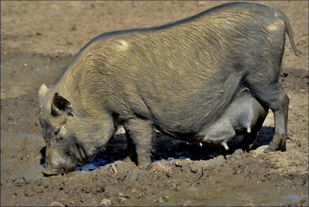 vietnamské prase